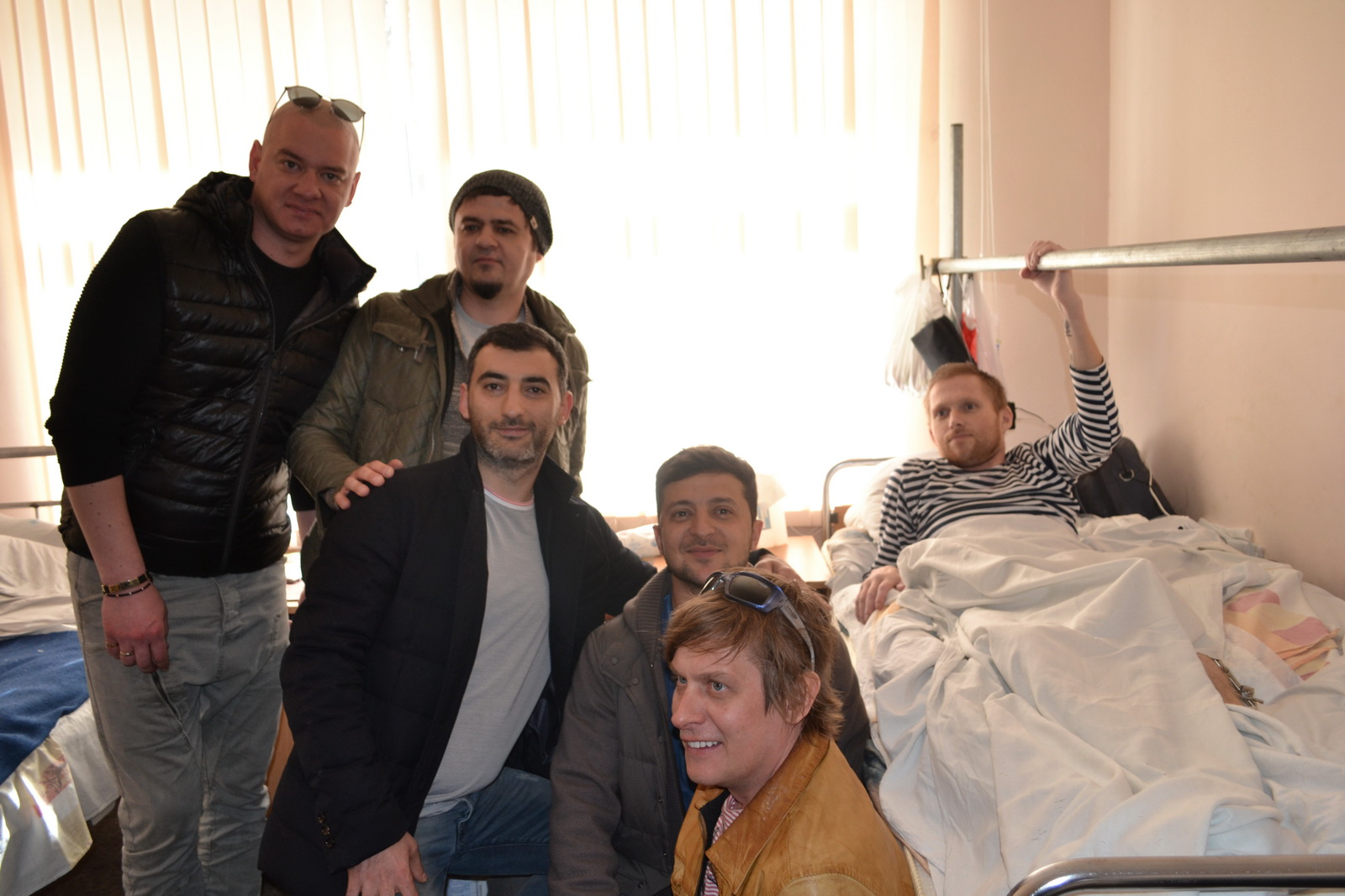 Зеленський у Військово-медичному клінічному центрі Південного регіону в Одесі.